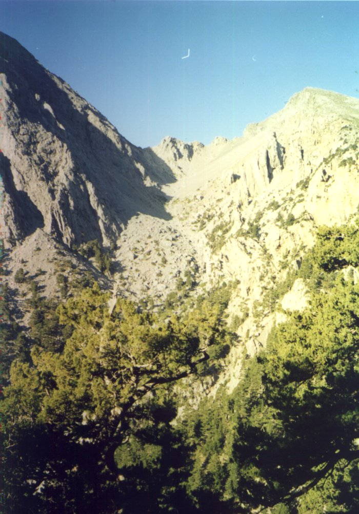 Van engelse wp (del) (cur) 23:52, 20 August 2004 . . Davidzuccaro (159465 bytes) (Samaria Gorge)